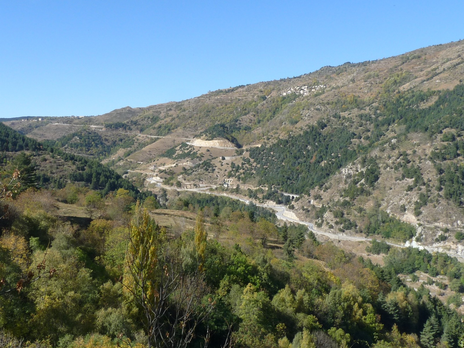 Route nationale 116 à Fontpédrouse, au pied de Sauto au loin, Pyrénées-Orientales, France